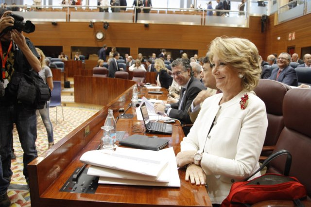 Segunda sesión del debate de investidura de Esperanza Aguirre